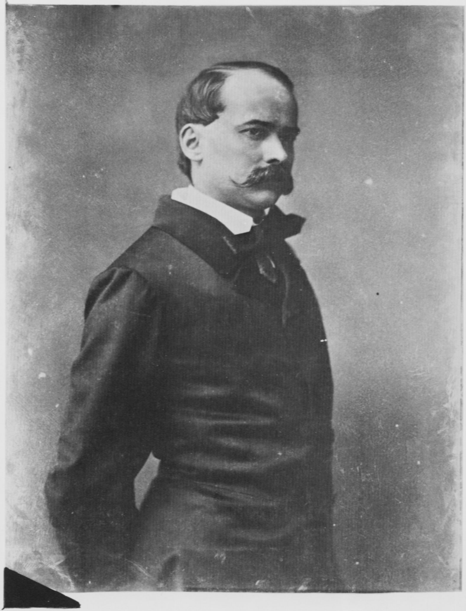 Tournachon, Gaspard-Félix: Théodore Barrière (1823-1877)